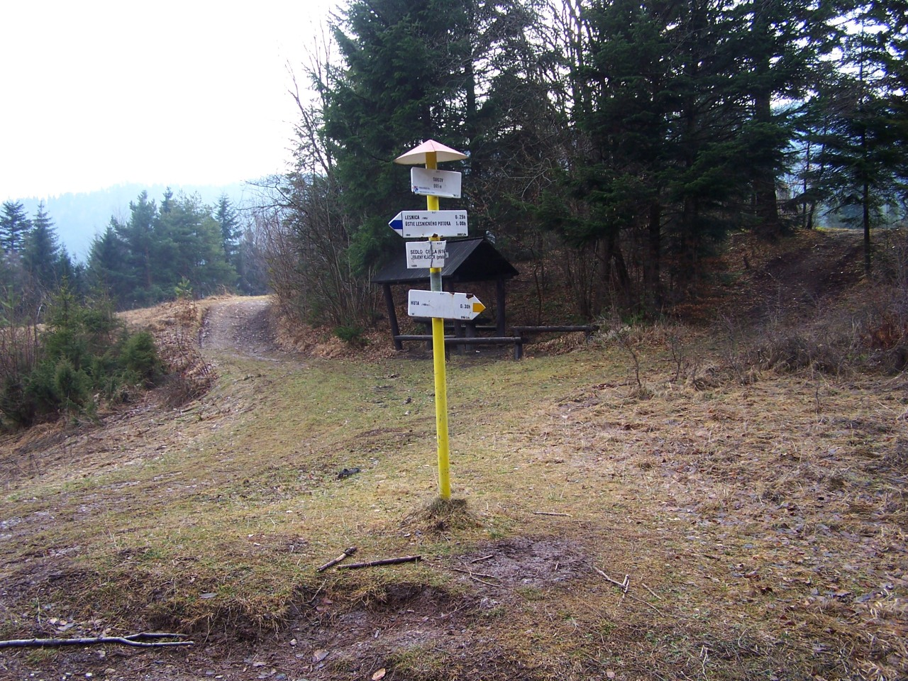 Przełęcz Limierz (Targov) w Pieninach (Grupa Golicy)